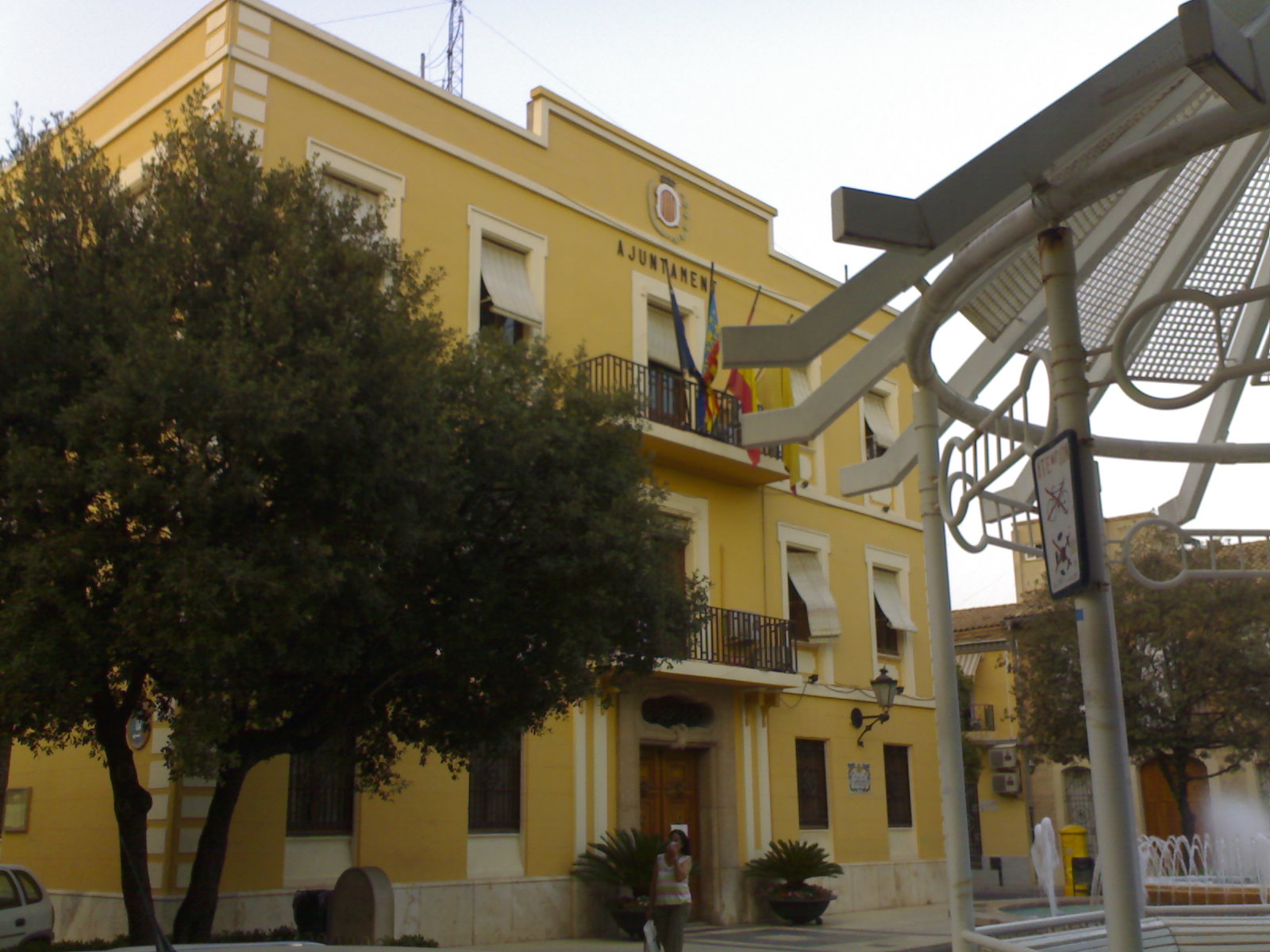 Ayuntamiento de Benetússer, en Valencia (España)